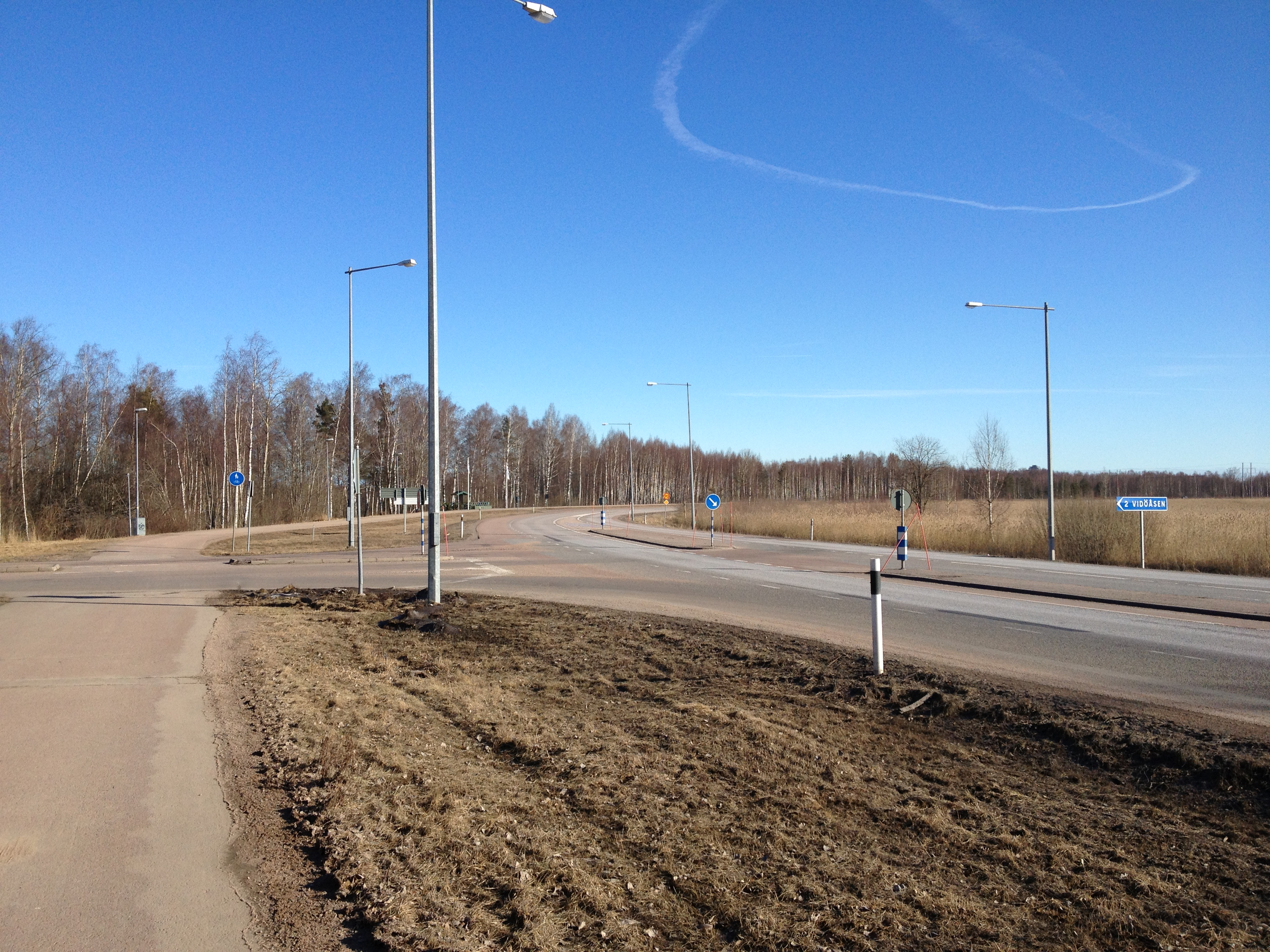 Hammaröleden som är en del av länsväg 236